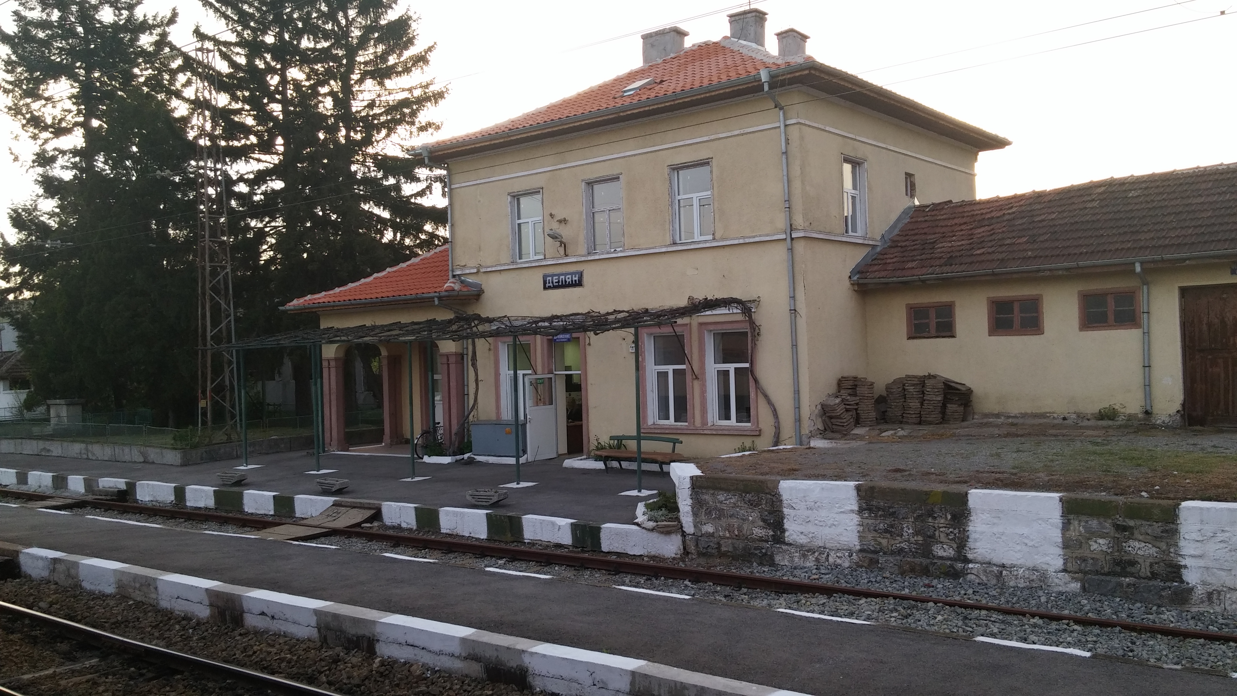 Железопътна гара Делян, Кюстендилско.